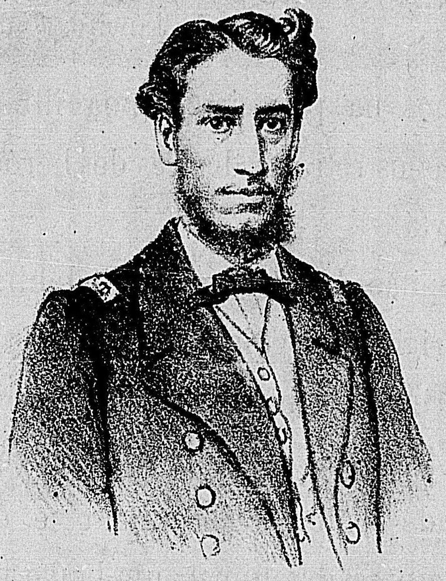 Desenho de Angelo Agostini, parte de original "Aos Heroes da Passagem de Humaitá", in:A Vida Fluminense, Rio de Janeiro